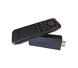 Dispositivo de streaming fabricado por Amazon